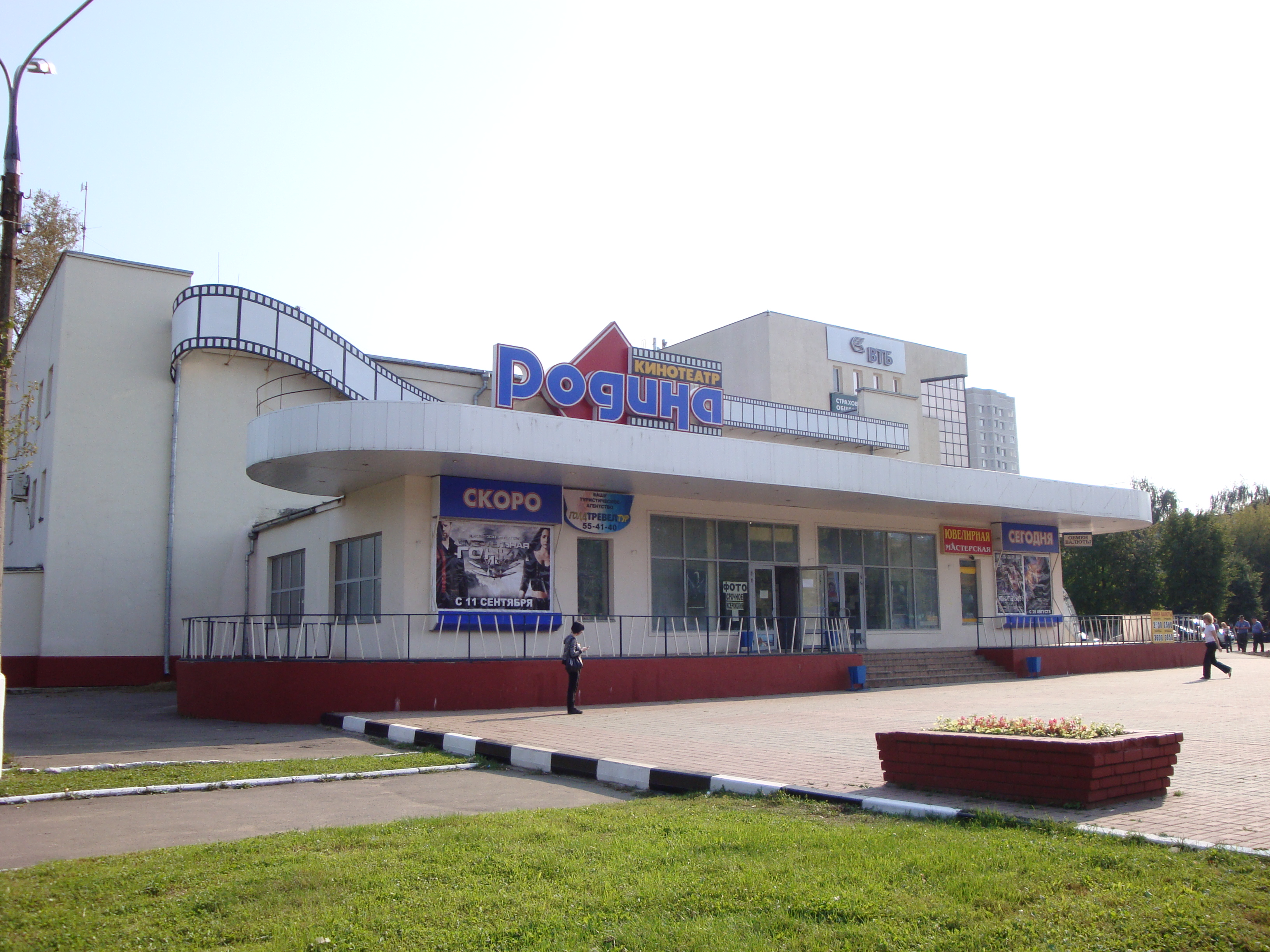 Кинотеатр "Родина" в Подольске (Московская область)